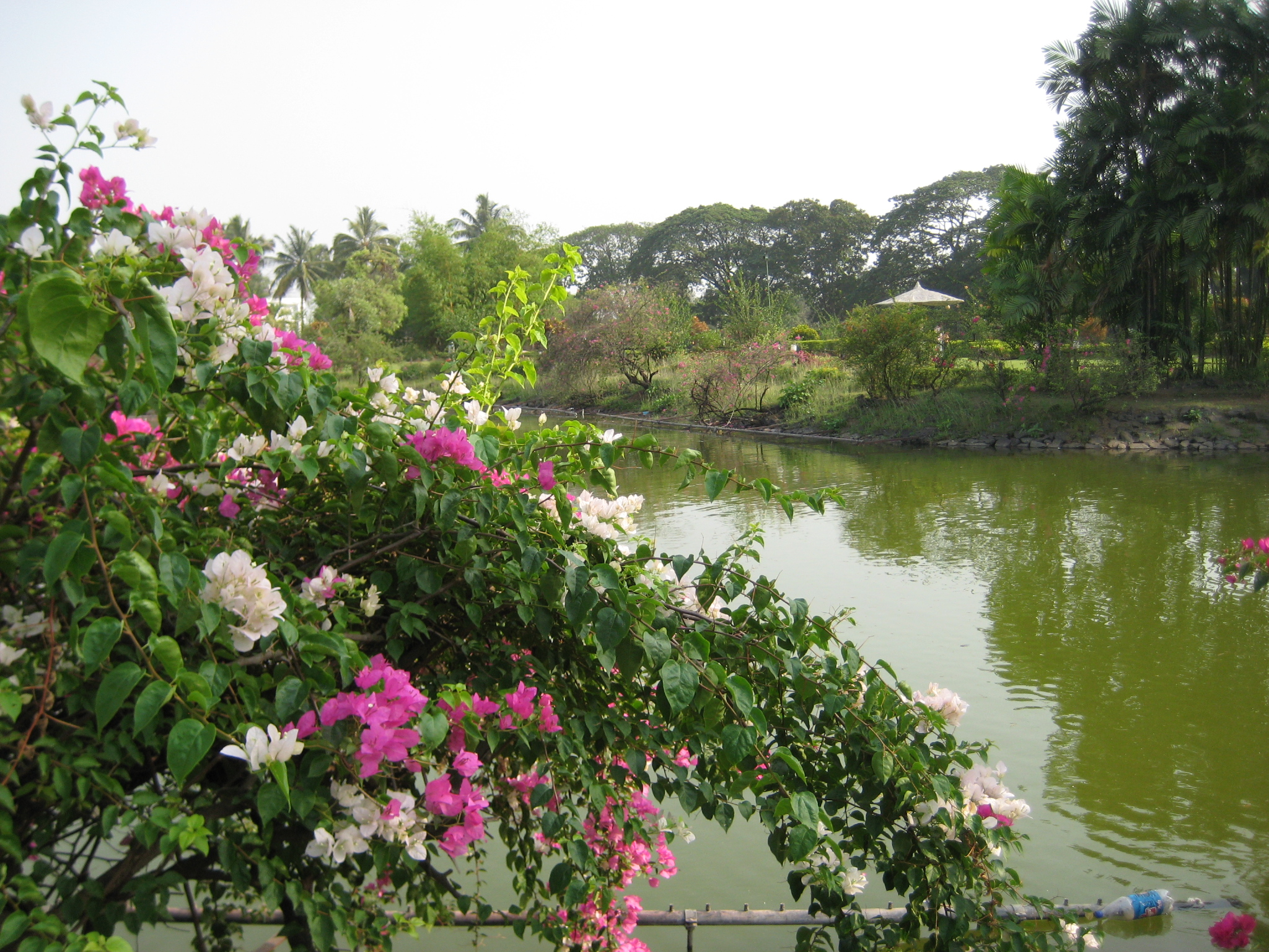 Vanganga Lake, Dadra